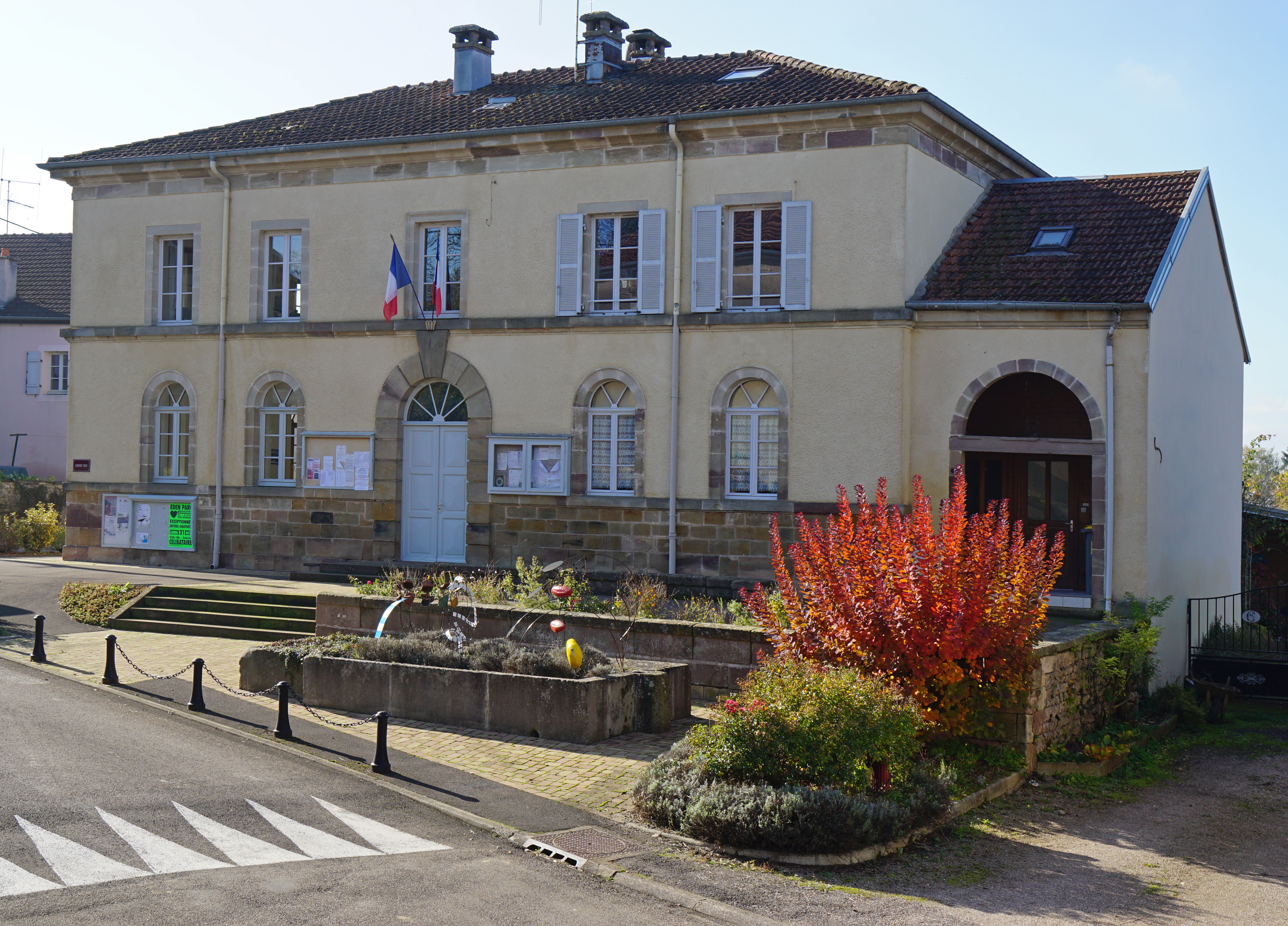 La mairie d'Équevilley.